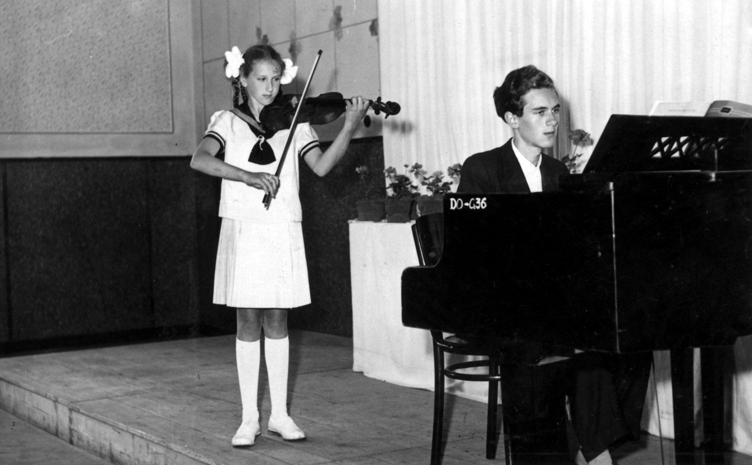 opis: 11.ročná Jela Špitková s bratom. Licensing zdroj: Jela Špitková, osobne Prof. Jela Špitková povoľuje použitie tohto obrázka celosvetovo.